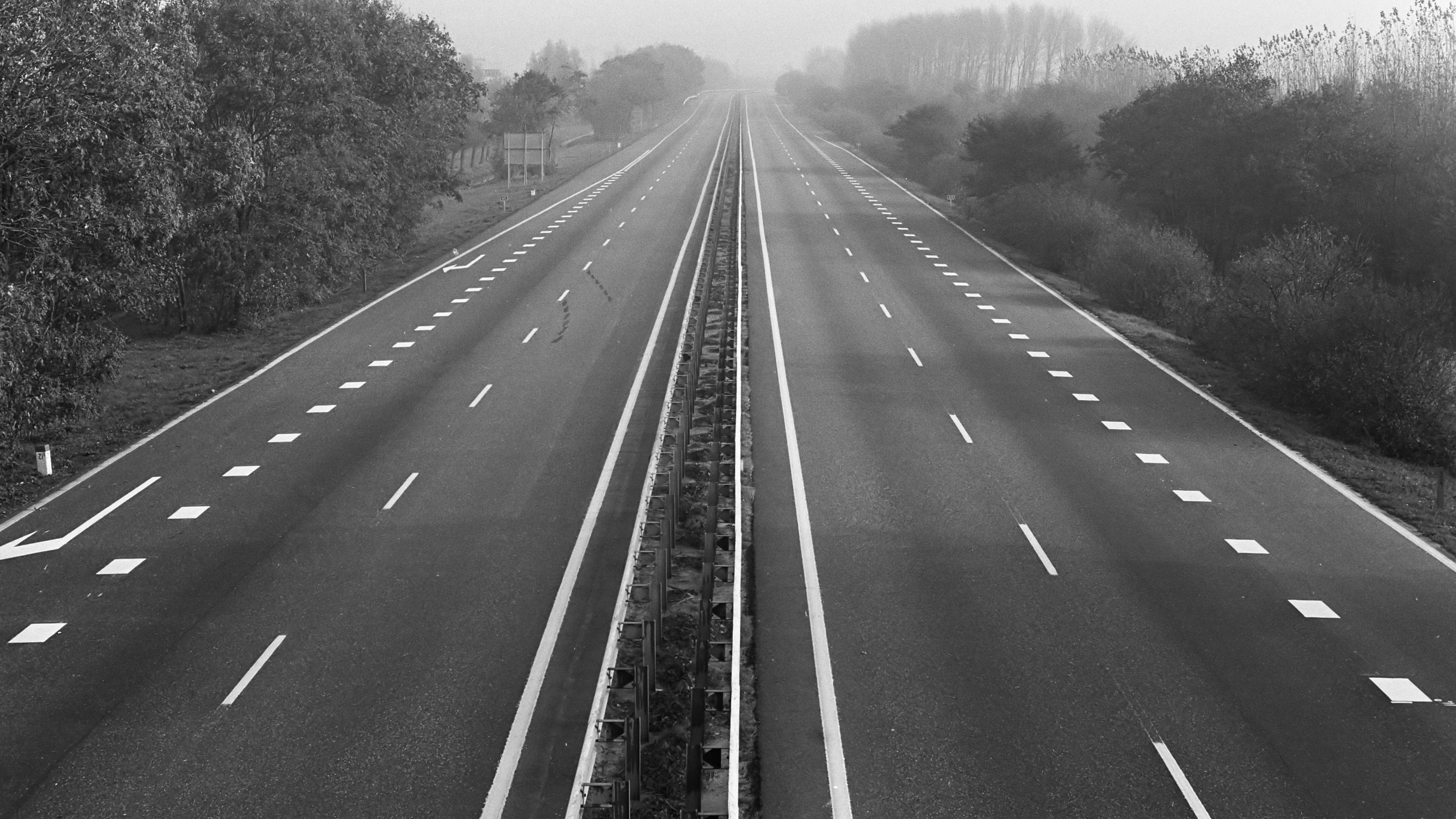 Autoloze zondag in verband met de olieboycot. Lege autosnelwegen 4 november 1973